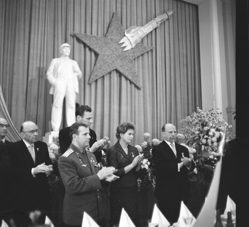 Zentralbild - Kohls 21.10.1963 Festlicher Empfang für die sowjetischen Kosmonauten. - Der Erste Sekretär des ZK der SED und Vorsitzende des Staatsrats der DDR, Walter Ulbricht, der Vorsitzende des Ministerrates, Otto Grotewohl, und der Präsident des Nationalrates, Prof. Dr. Dr. Erich Correns, gaben am Abend des 20. Oktober anläßlich des Besuchs der sowjetischen Kosmonauten Valentina Tereschkowa und Juri Gagarin in der DDR einen großen festlichen Empfang im Kongreßsaal des ZK-Gebäudes. UBz. (v.r.n.l.): Walter Ulbricht, Valentina Tereschkowa, Juri Gagarin, Prof. Dr. Dr. Correns.